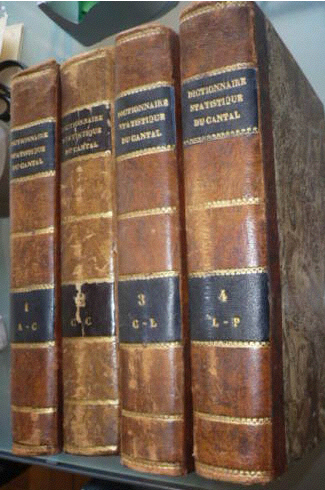 Dictionnaire statistique et historique du département du Cantal, 1856, Aurillac, imprimerie Veuve Picut, reliure de l'époque. Deribier Duchâtelet